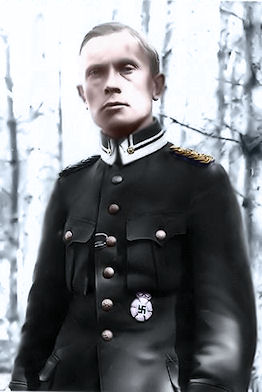 Väinö Mikkola